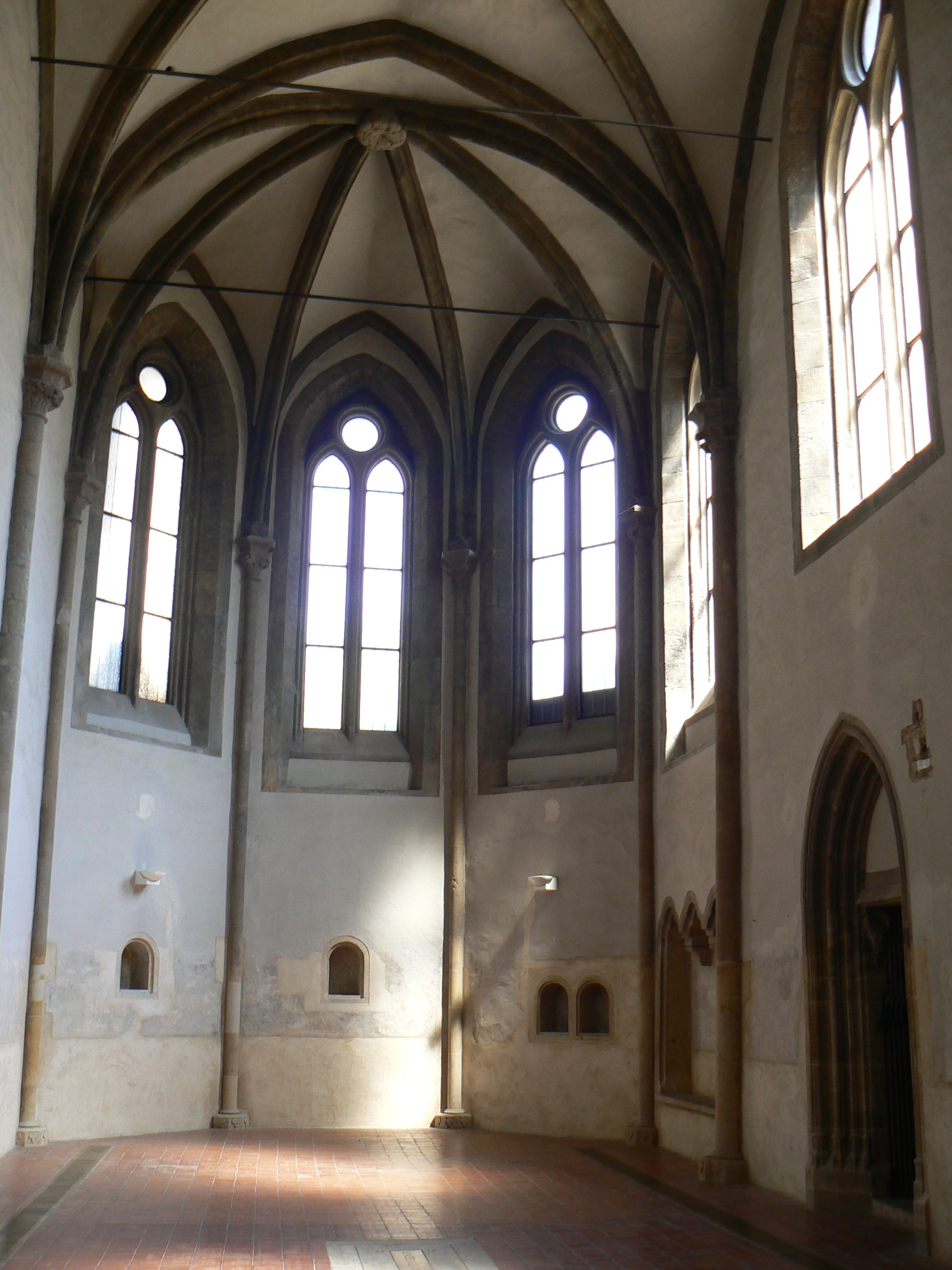 Presbytář kostela sv. Františka v Anežském klášteře